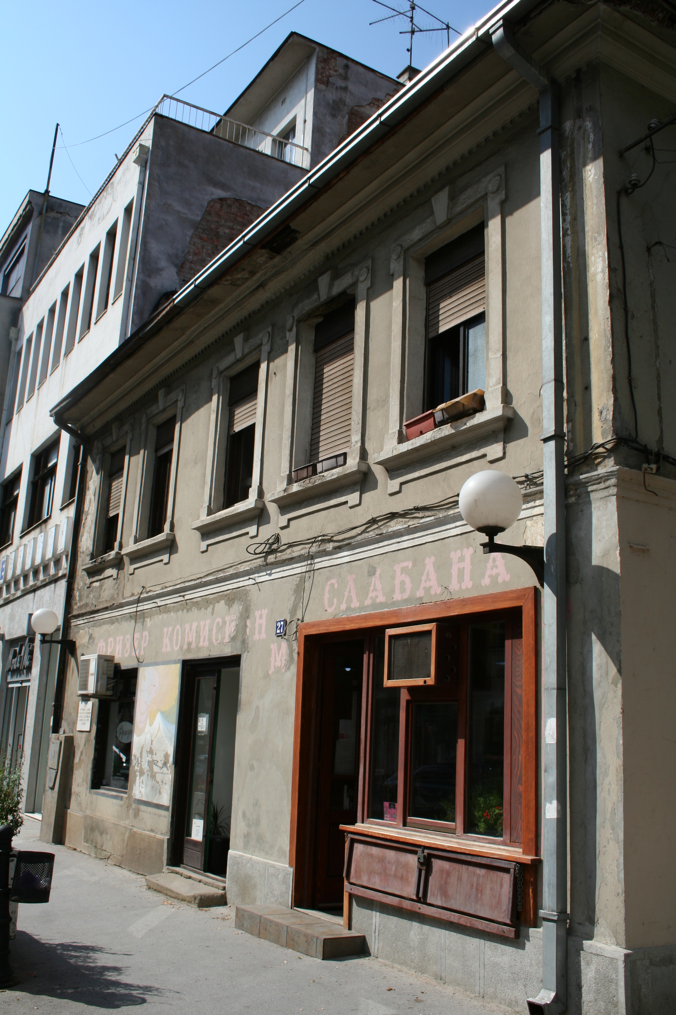 Kuća Dabića, Valjevo